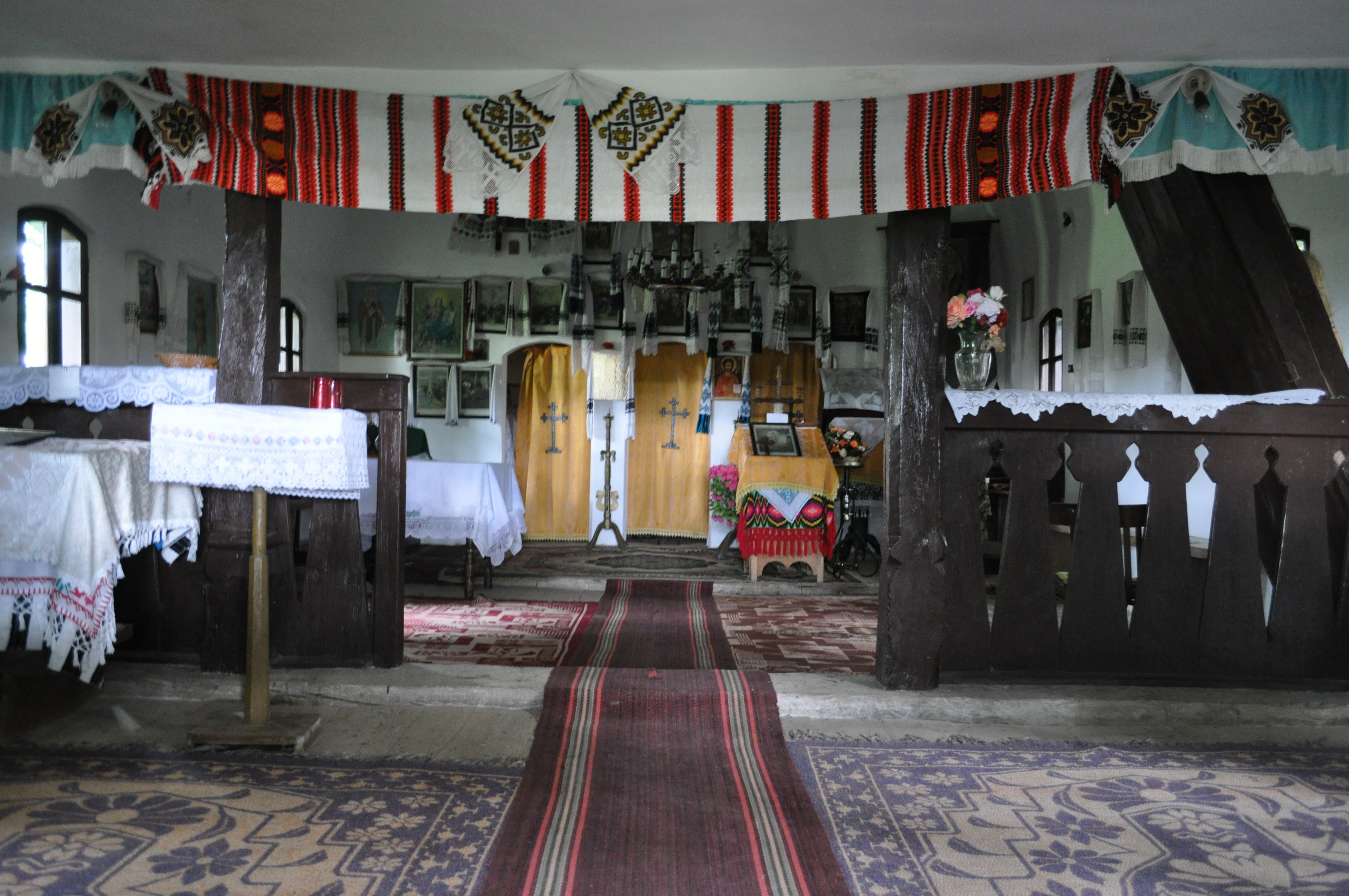 Biserica de lemn „Înălțarea Sfintei Cruci” din Bălcești, județul Cluj